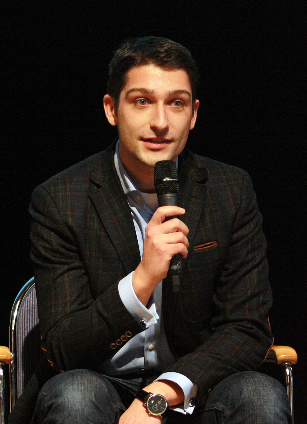 Florian Bernschneider, Betriebswirt und Politiker (FDP), seit 2009 Abgeordneter im Deutschen Bundestag